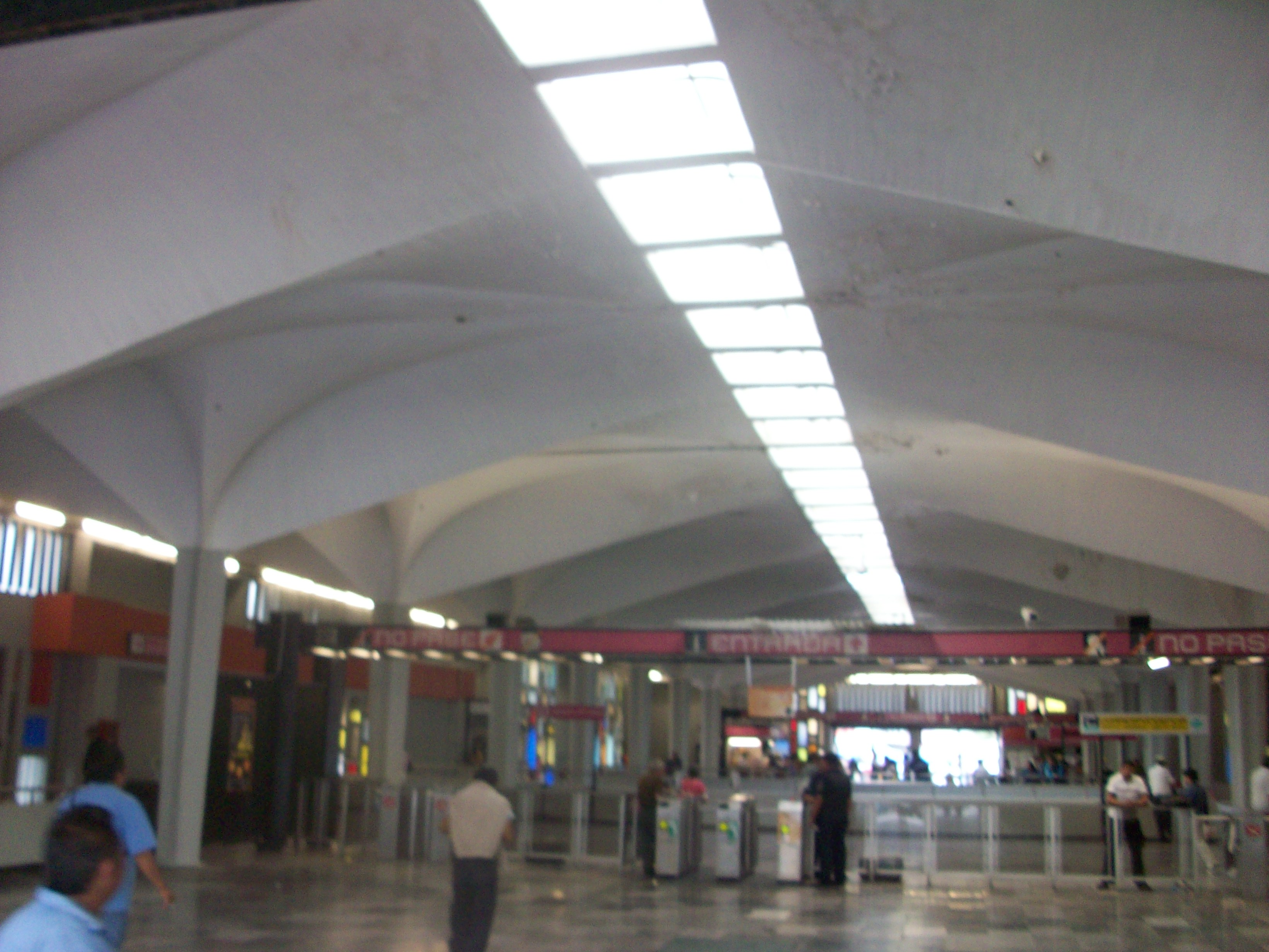 Vestíbulo de la estación Candelaria de la linea 1